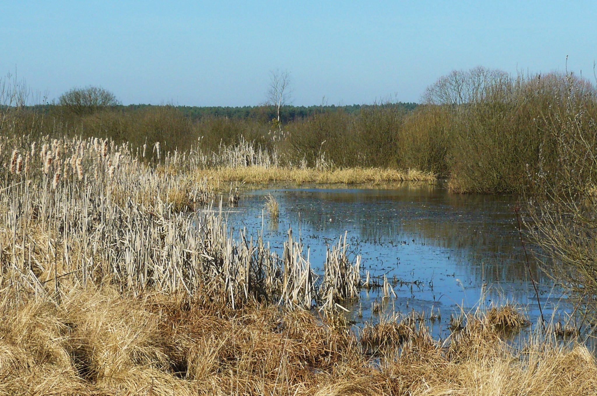 Jez. Rzecińskie.